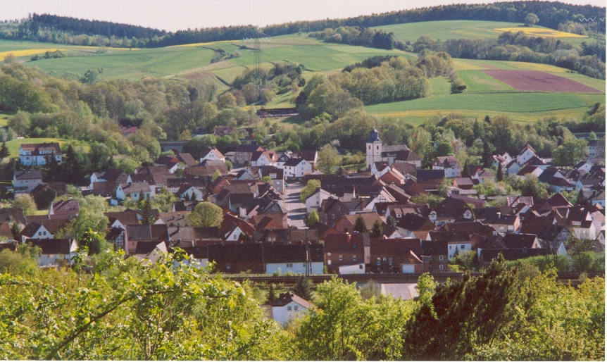 Weiterode vom "Pilz" aus gesehen